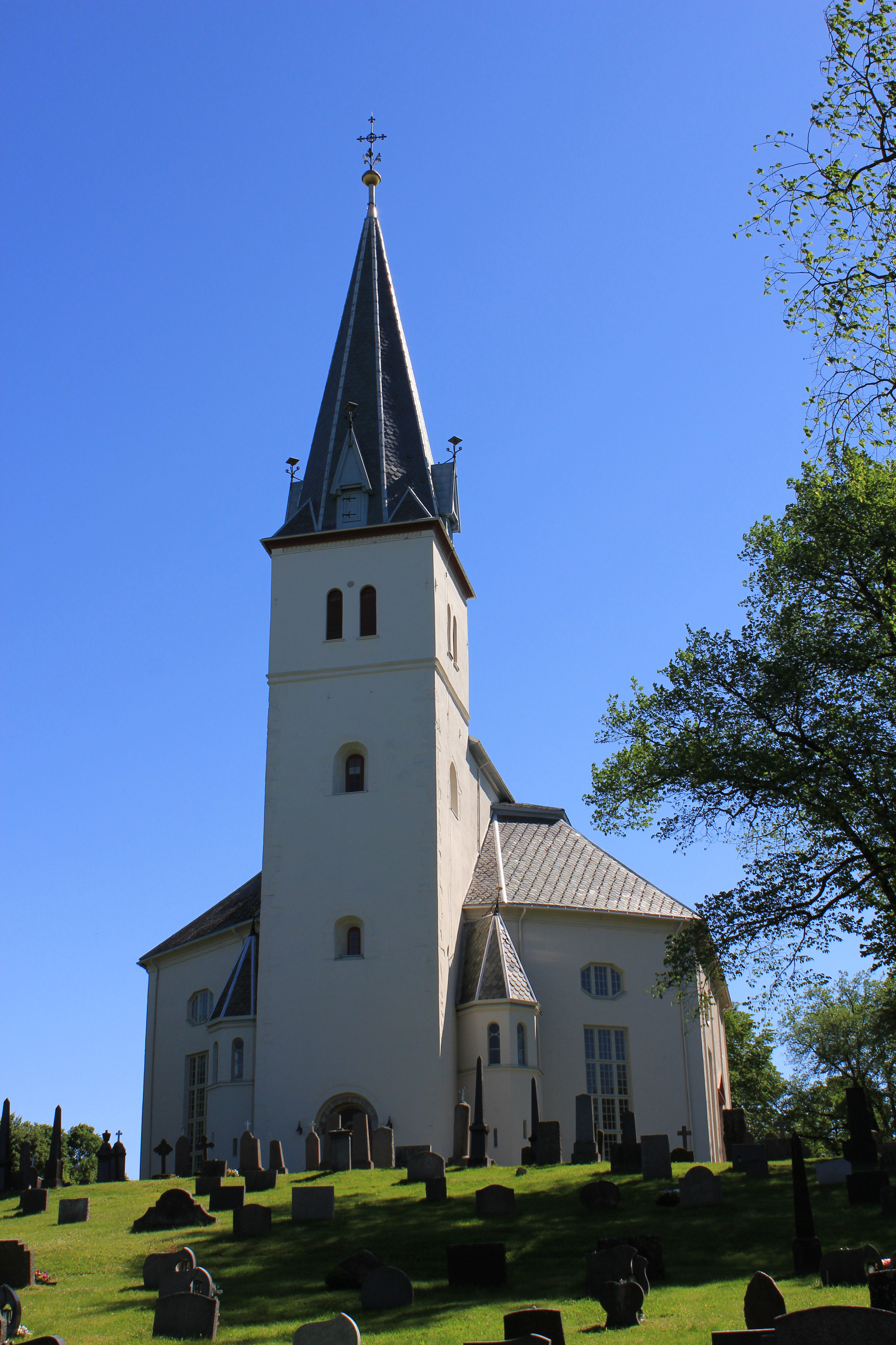 Vang kirke ved Hamar på Hedemarken i Hedmark - Norway